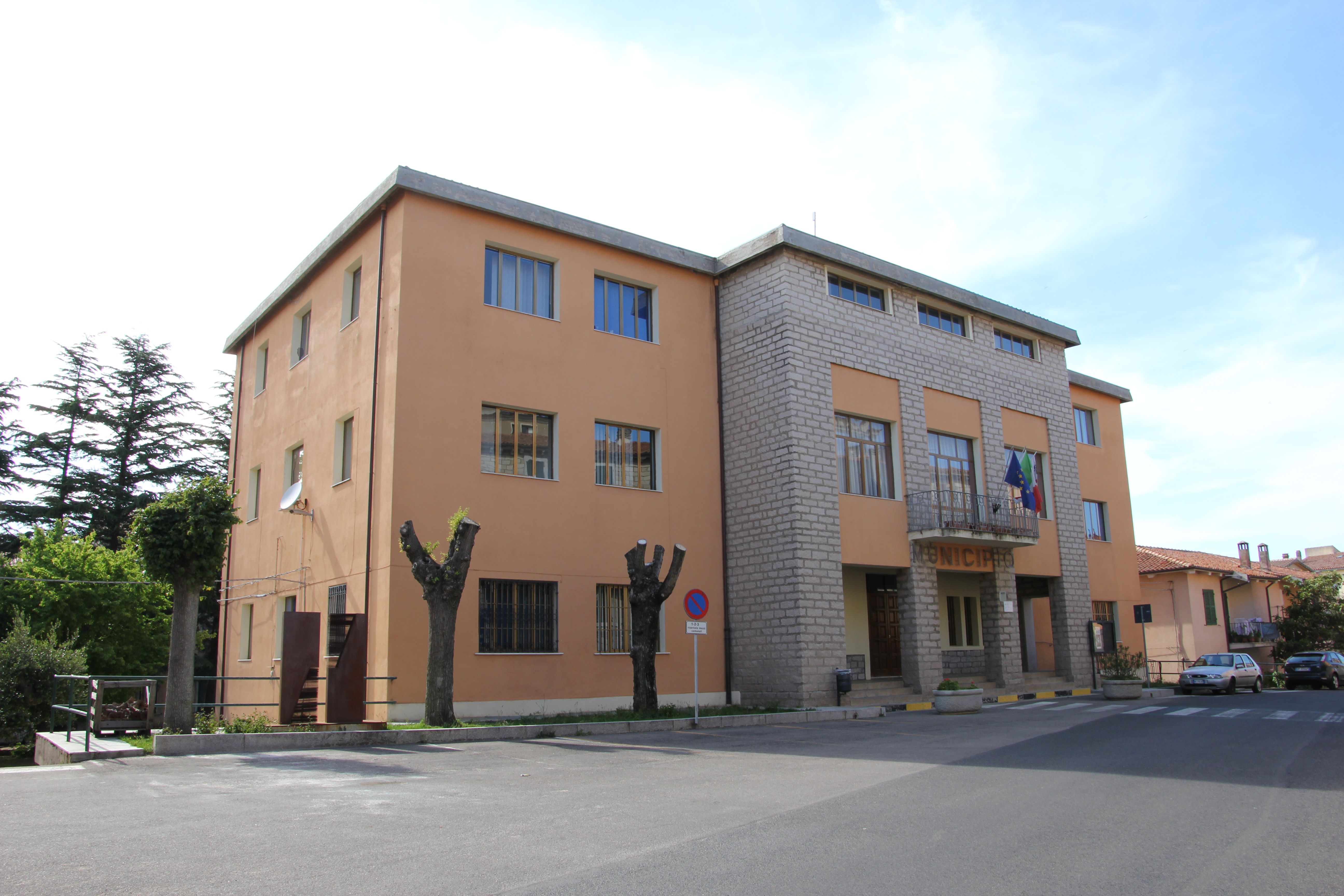 Calangianus - Municipio